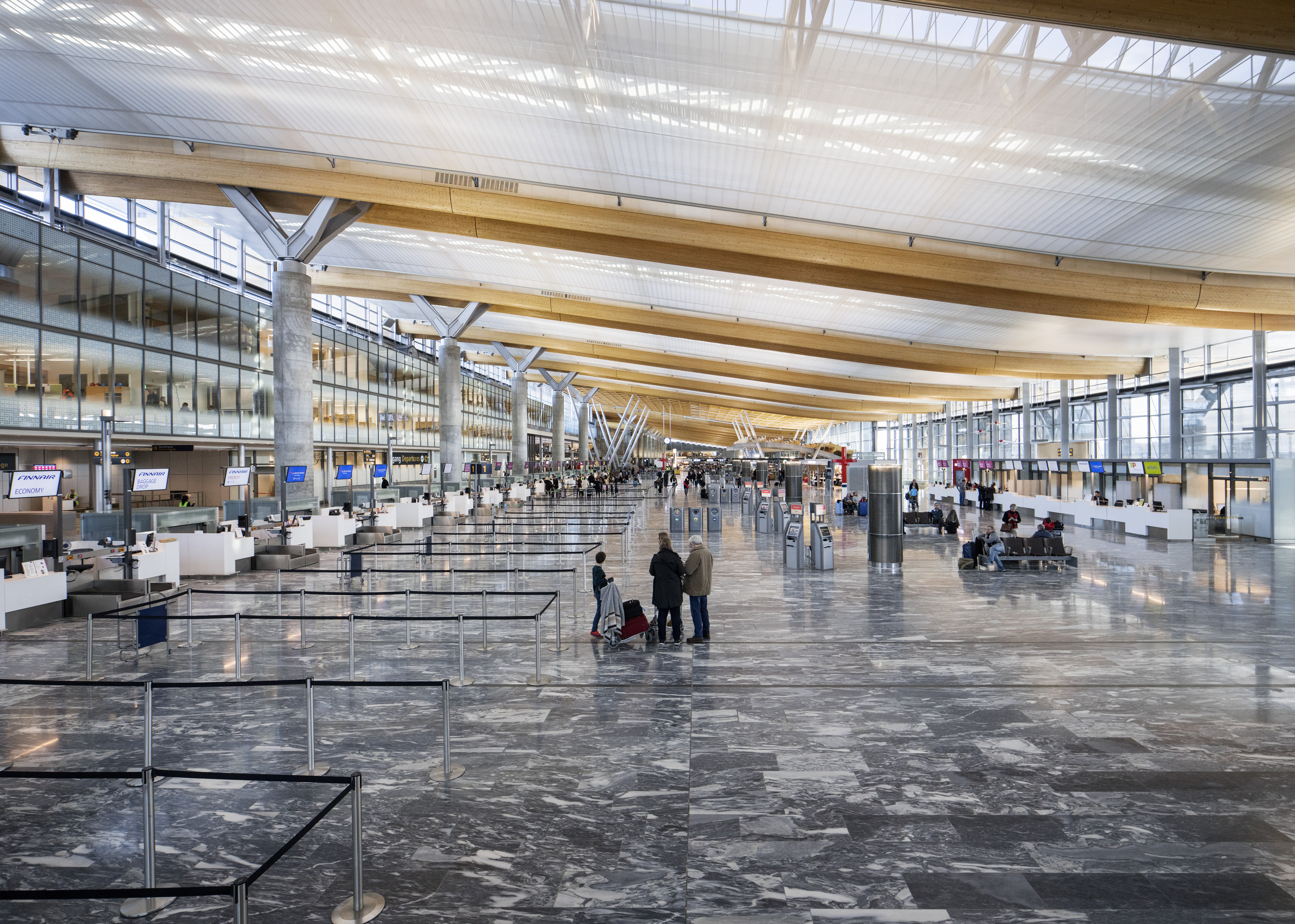 Innsjekkingsområde, Oslo lufthavn